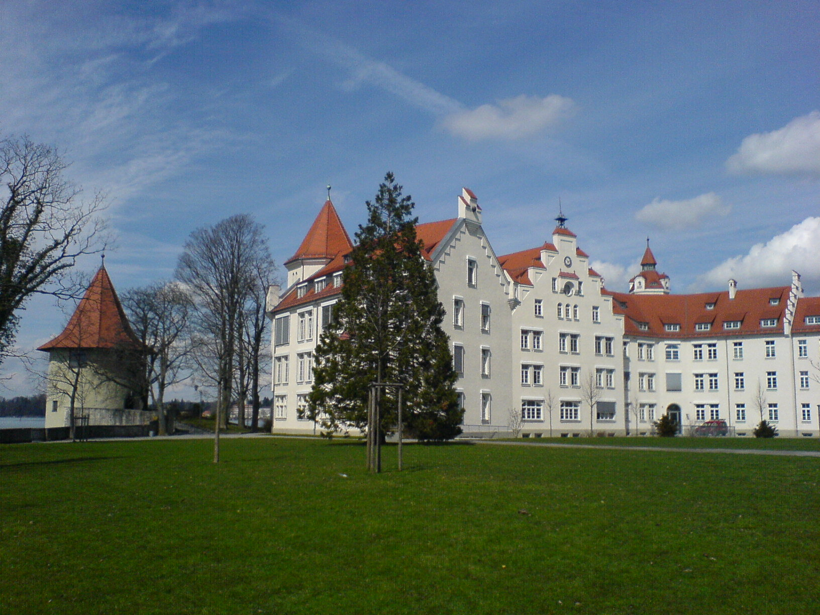 Pulverturm Lindau neben der Luitpold-Kaserne